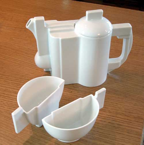 Tetera y tazas constructivistas de Kasimir Malevich